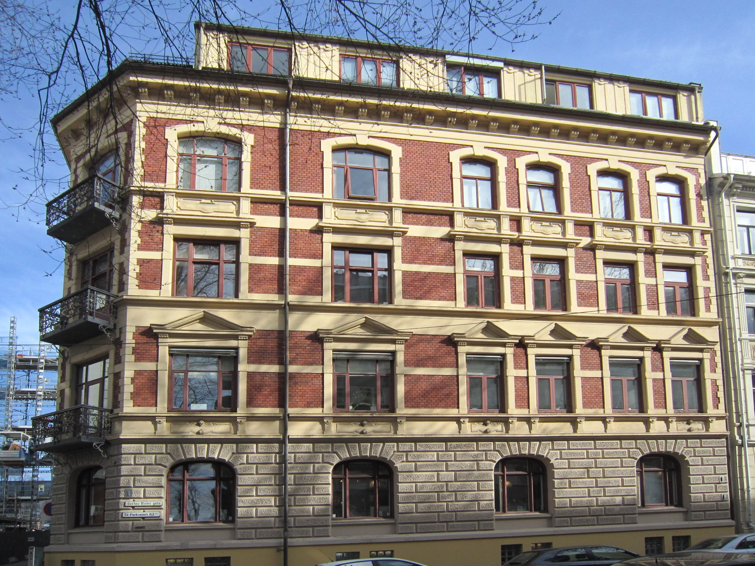 Parkveien 62 vender denne siden til Gustav Bloms gate.